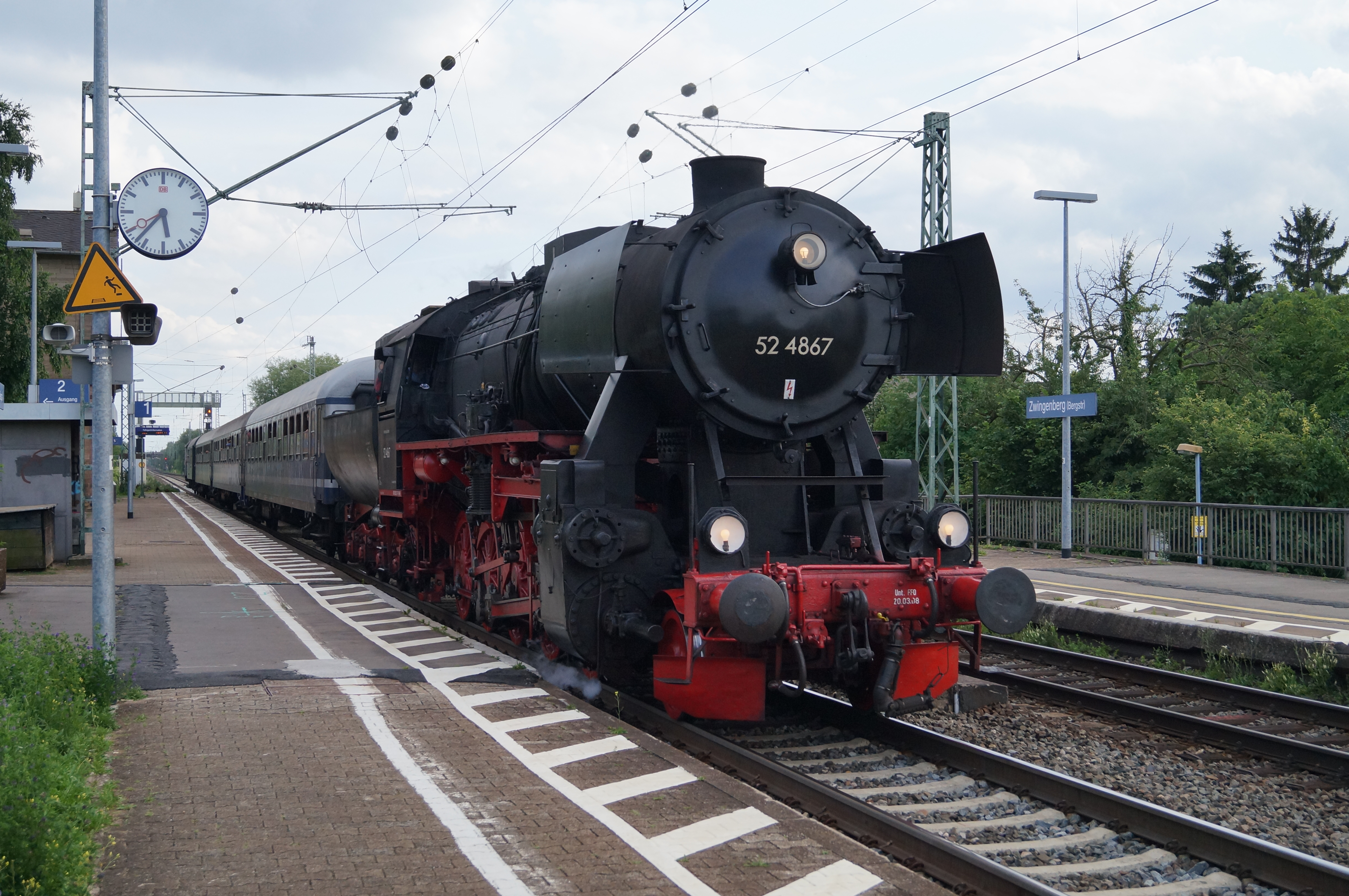 Kriegslokomotive der DR-Baureihe 52 im Zwingenberger (Bergstraße) Bahnhof auf dem Weg Richtung Frankfurt am Main.